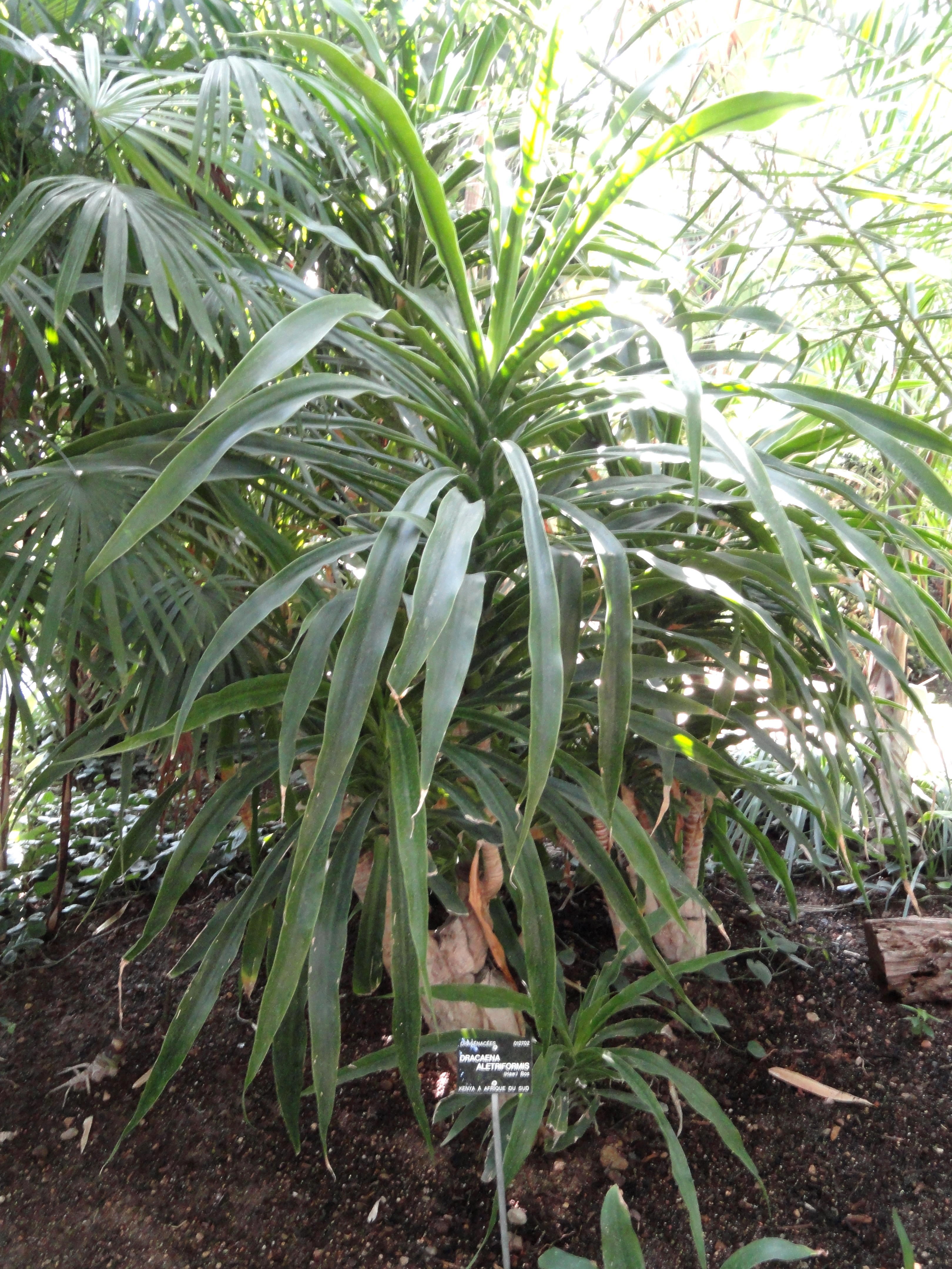 Dracaena aletriformis specimen in the Jardin Botanique de Lyon, Parc de la Tête d'Or, Lyon, France.